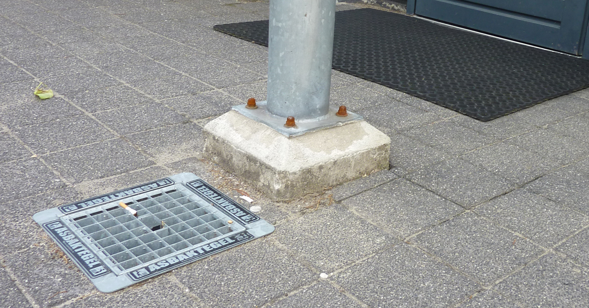 asbaktegel